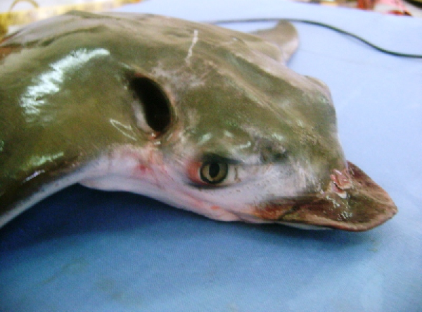 Aetobatus flagellum, скат рода орляковых скатов